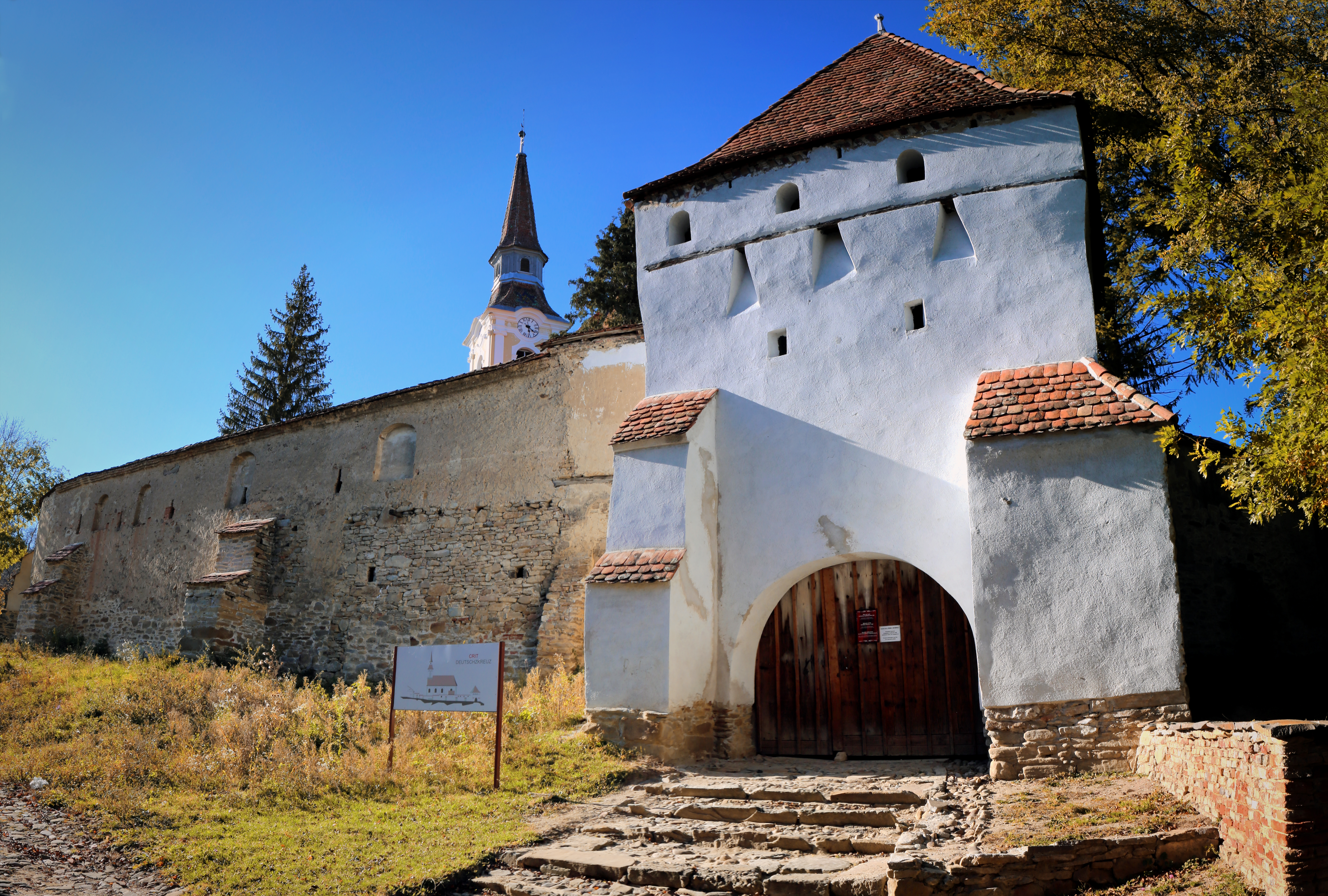 Ansamblul bisericii evanghelice fortificate 03